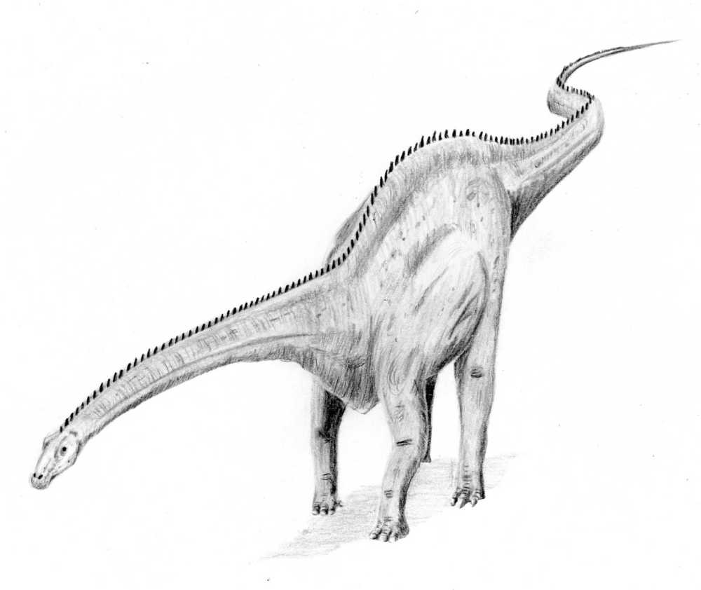 Diplodocus